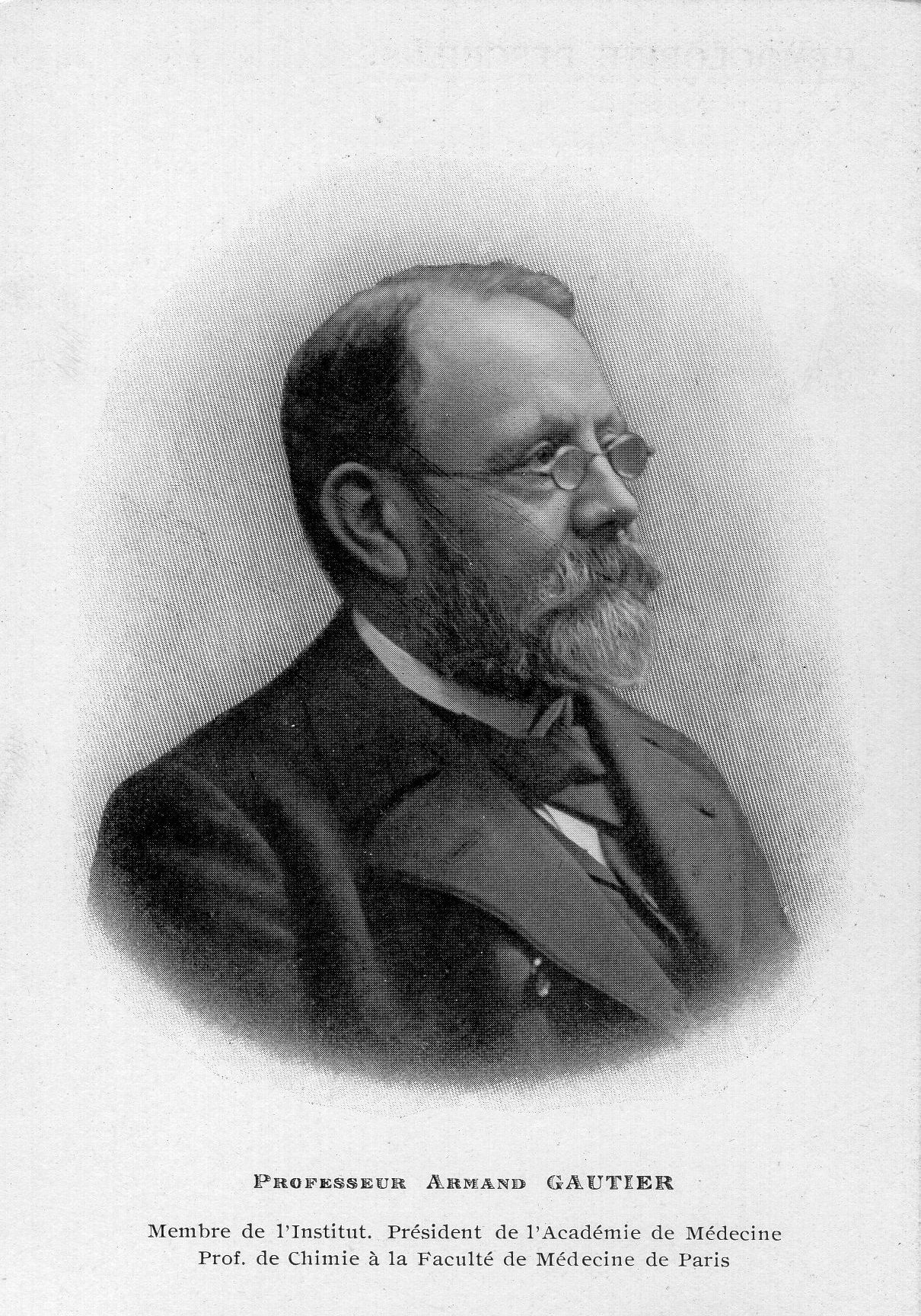 Foto di Armand Gautier, presidente de "l'Académie de Médicine" e docente di Chimica presso la facoltà di Medicina di Parigi.